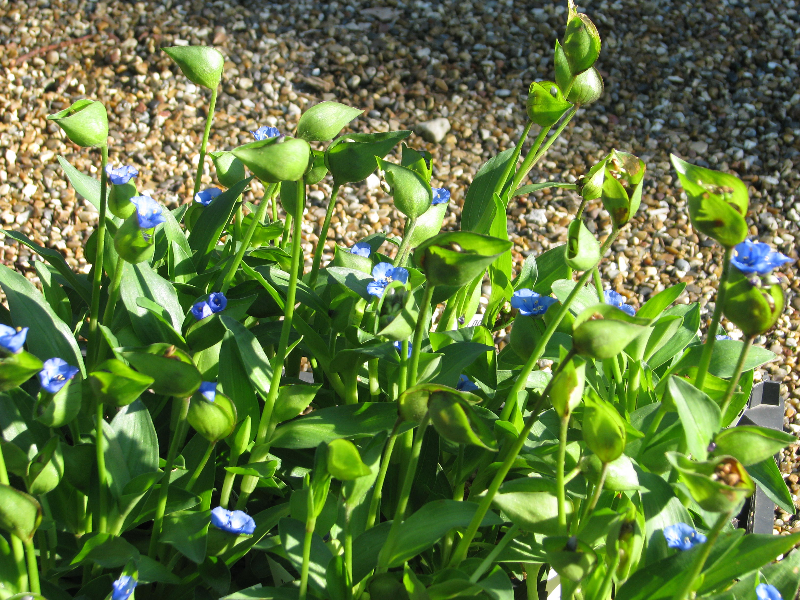 Commelina tuberosa ex BSWJ10353